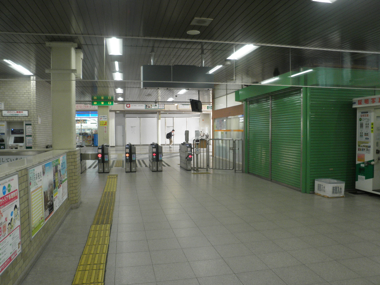 改札は無人である